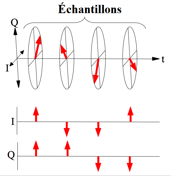 Illustration de l'échantillonnage du signal en I et Q nécessaire le traitement du signal d'un radar Doppler pulsé cohérent.